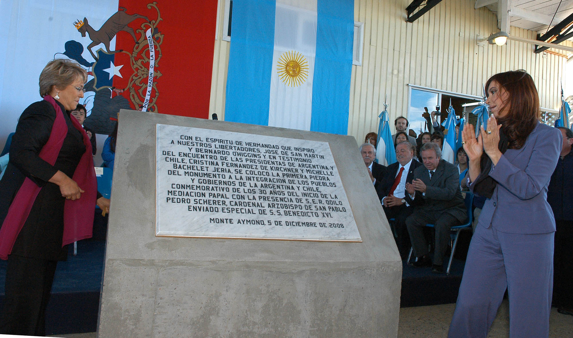 Acto en el que participaron Michelle Bachelet y Cristina Fernández de Kirchner en conmemoración de las gestiones que realizara el cardenal Samoré y que evitaron una guerra entre Argentina y Chile.